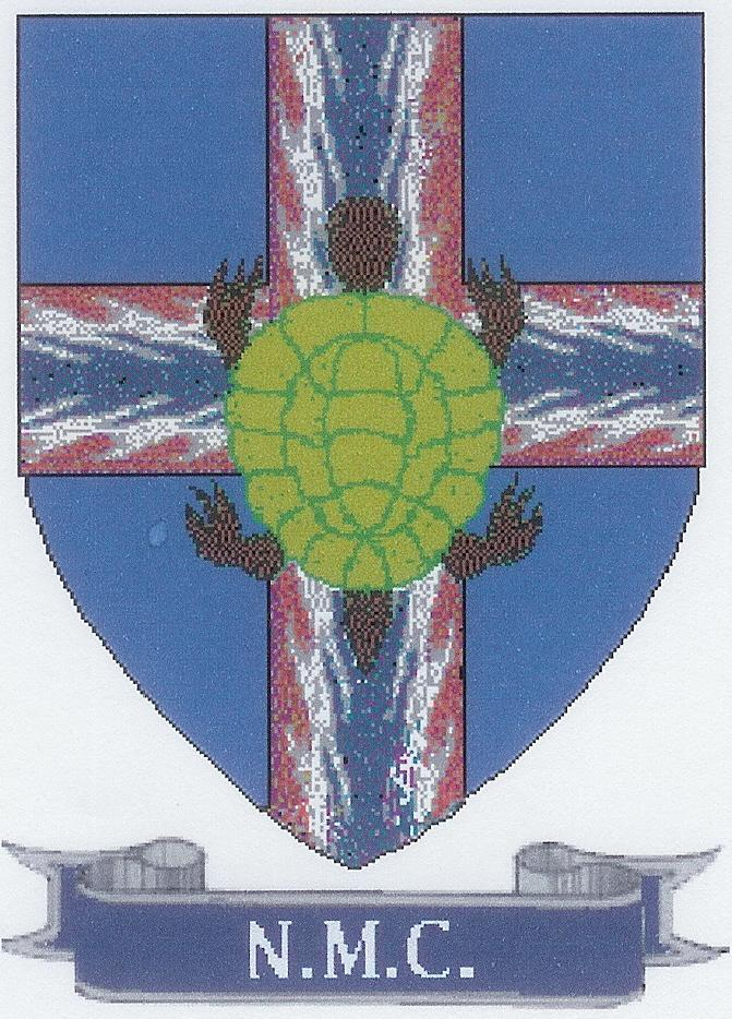 Blason N.M.C.